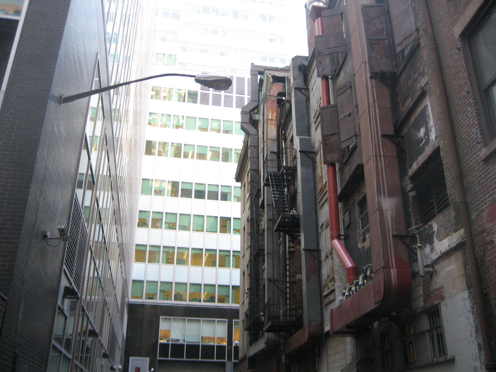 Marketfield Street, NYC